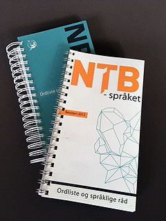 NPK-språket, Nynorsk pressekontors språkbok og NTB-språket, Norsk Telegrambyrås språkbok, fra henholdsvis 2007 og 2012